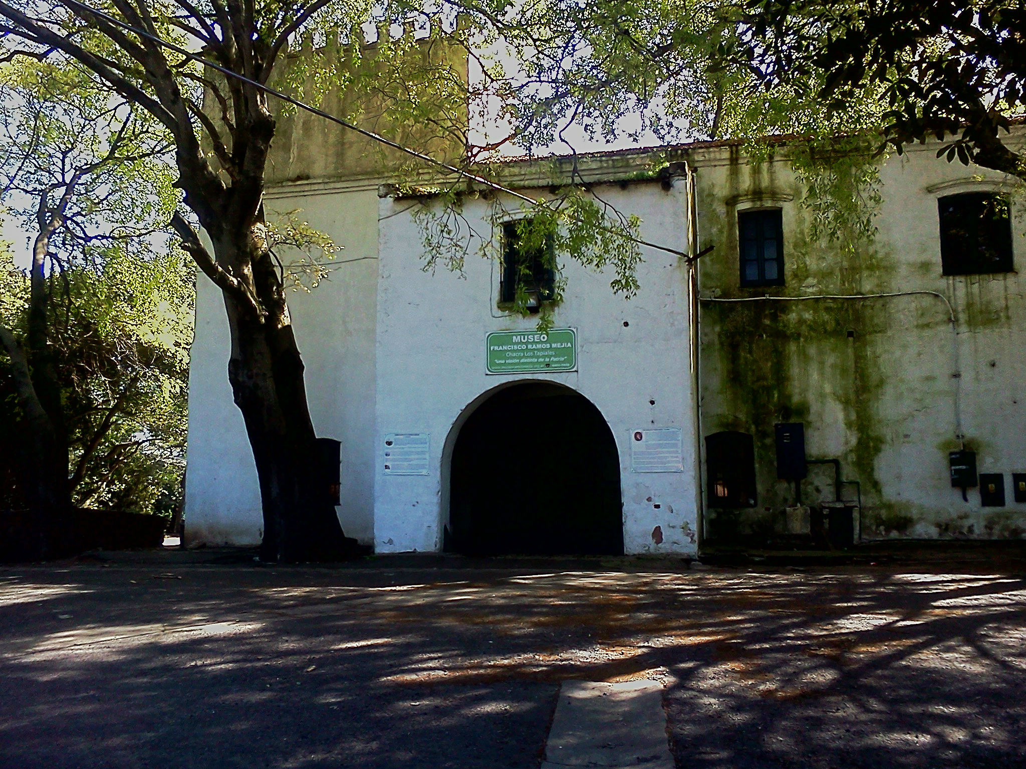 Entrada al Museo "Francisco Ramos Mejía", hacendado de la antigua Chacra de Los Tapiales.